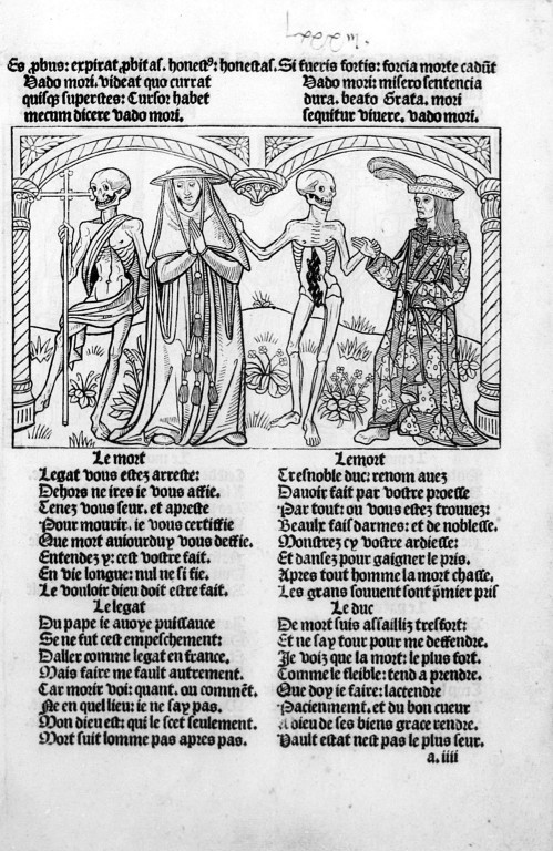 La Danse macabre. Paris, Guy Marchant, 1486. Fig. folio a iiii : Un légat du pape et un duc. Illustration numérisée d'après le microfilm R 1760. Paris. BnF (Réserve des Livres rares et précieux). Cote : Res Ye 189/Microfilm R 1760